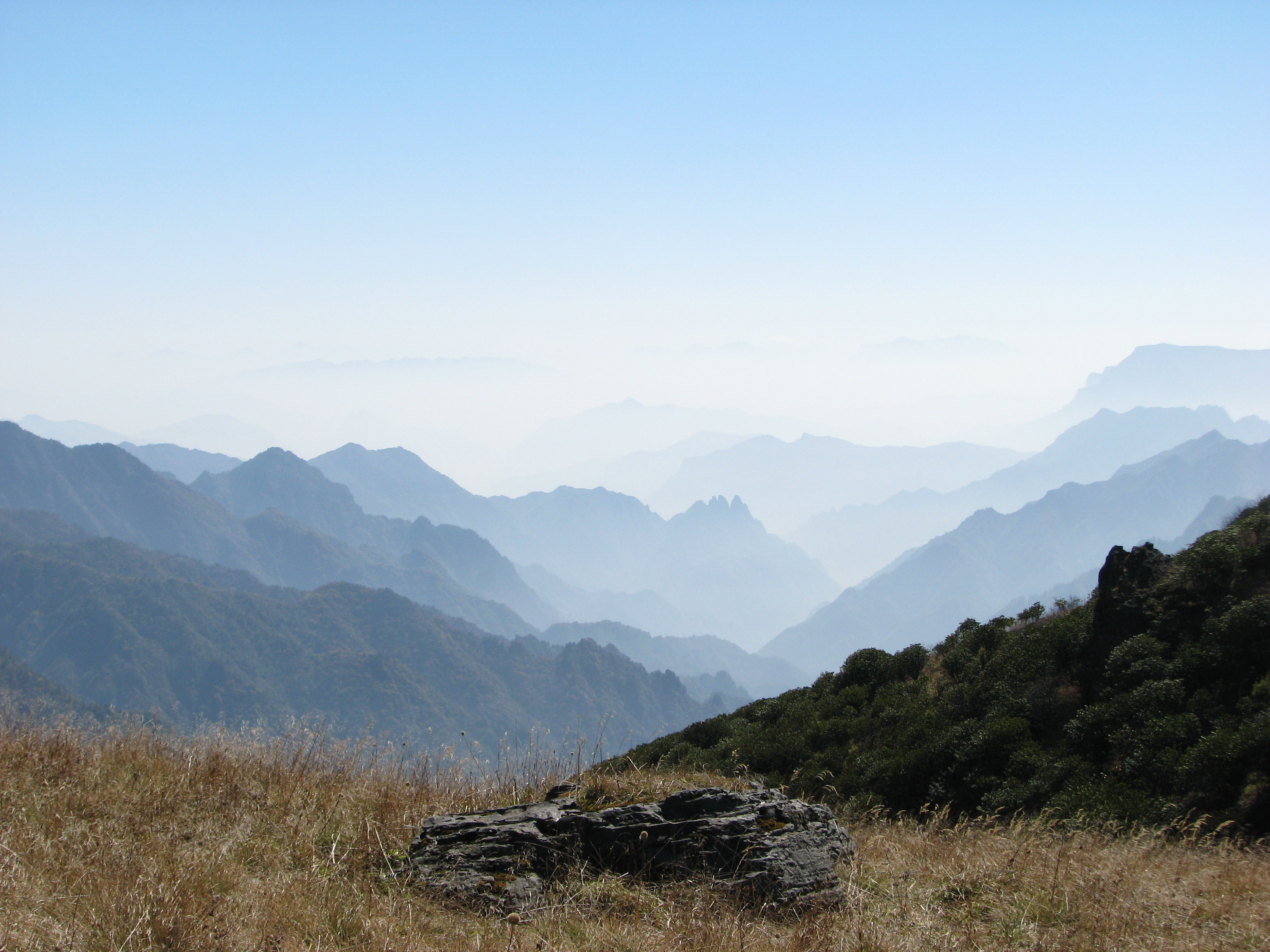 老君山风光